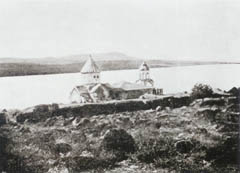 Adır Adası; Լիմ կղզու մենաստանը հյուսիս-արևելյան կողմից